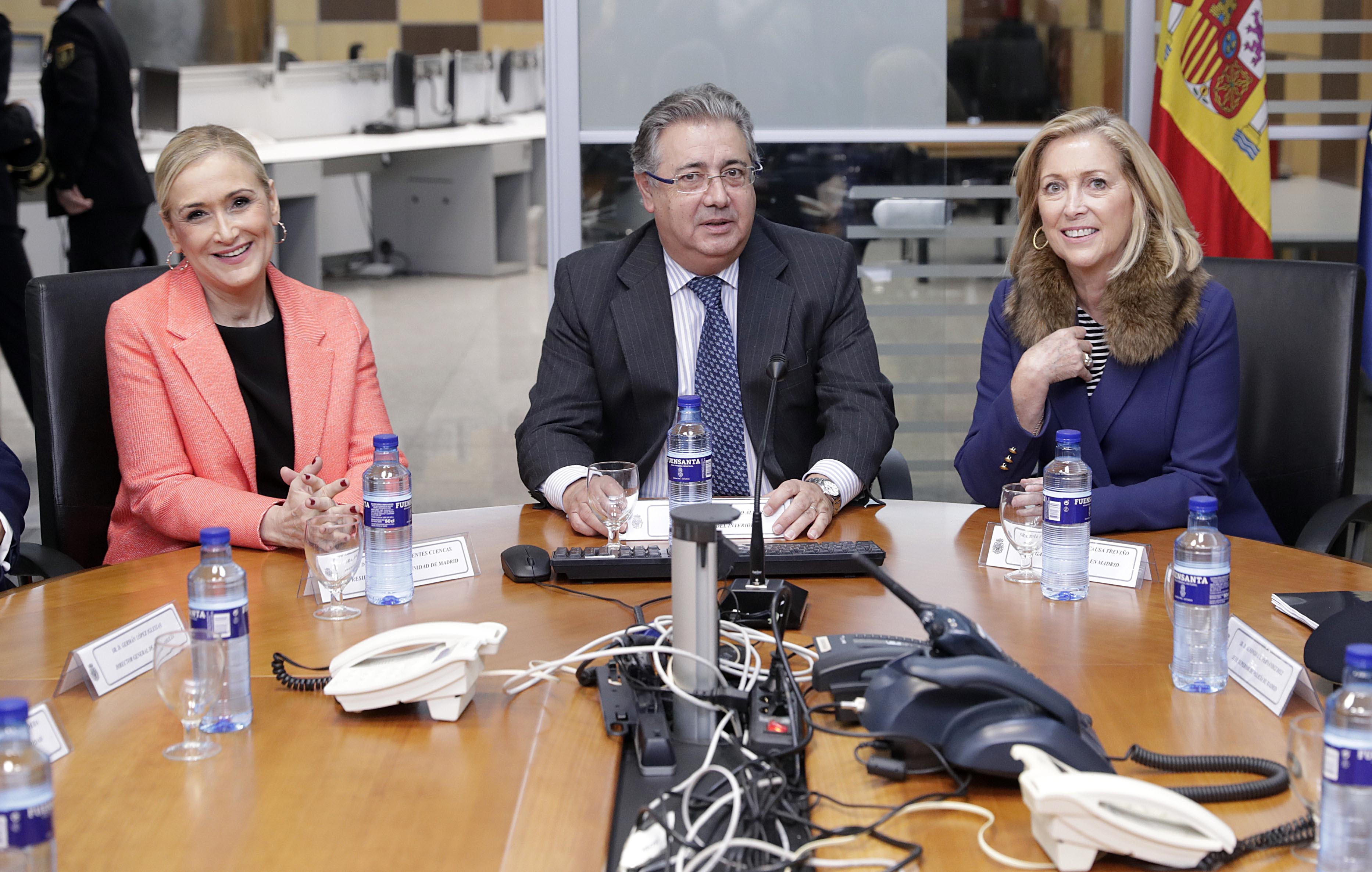 CIFUENTES ACOMPAÑA AL MINISTRO DEL INTERIOR A LA JEFATURA SUPERIOR DE POLICÍA DE MADRID PARA FELICITAR A LOS AGENTES Y TRABAJADORES QUE GARANTIZAN LA SEGURIDAD EN ESTAS FIESTASLa presidenta de la Comunidad de Madrid, Cristina Cifuentes, acompaña al ministro del Interior, Juan Ignacio Zoido, en su visita a la Jefatura Superior de Policía de Madrid para felicitar a los agentes y trabajadores que estarán de servicio esta noche para garantizar la seguridad durante las fiestas de Nochevieja y Año Nuevo.Foto: D.Sinova / Comunidad de Madrid